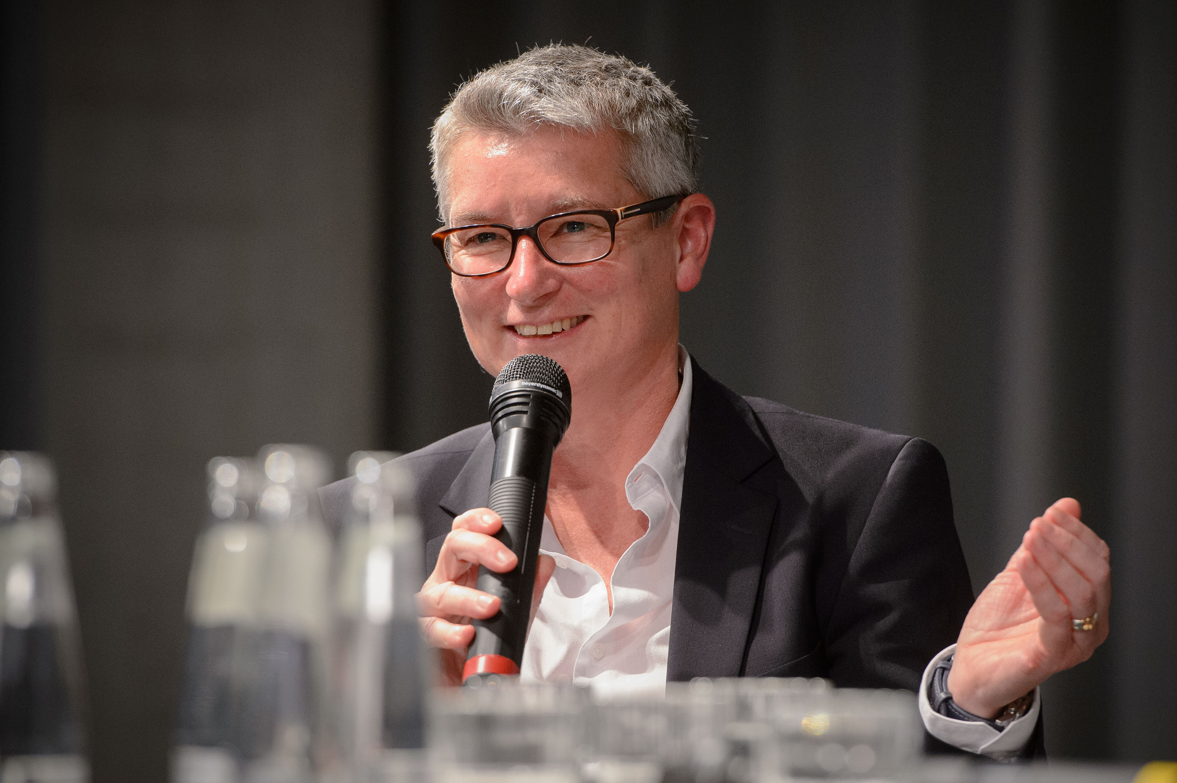 Prf. Sabine Hark (interdisziplinäre Frauen- und Geschlechterforschung TU Berlin und Leiterin des ZIFG), Foto